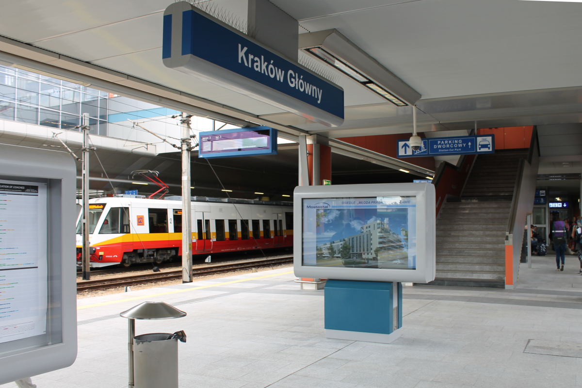 Peron 2 dworca głównego w Krakowie. This photo was taken during Railway Wikiexpedition 2014 set up by Wikimedia Polska Association in cooperation with Fundacja Grupy PKP. You can see all photographs in category Wikiekspedycja kolejowa 2014.